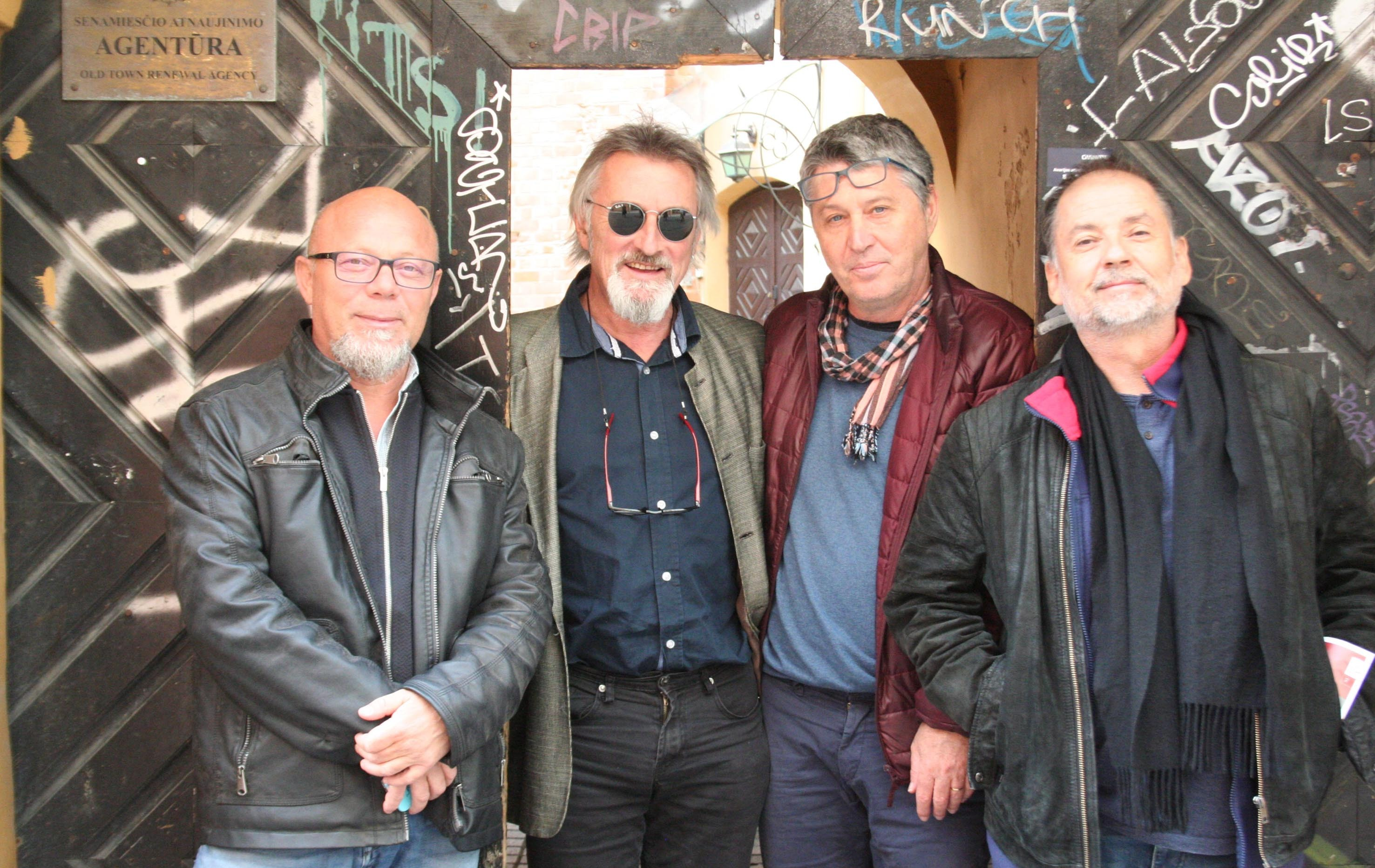 Vilnius 2018